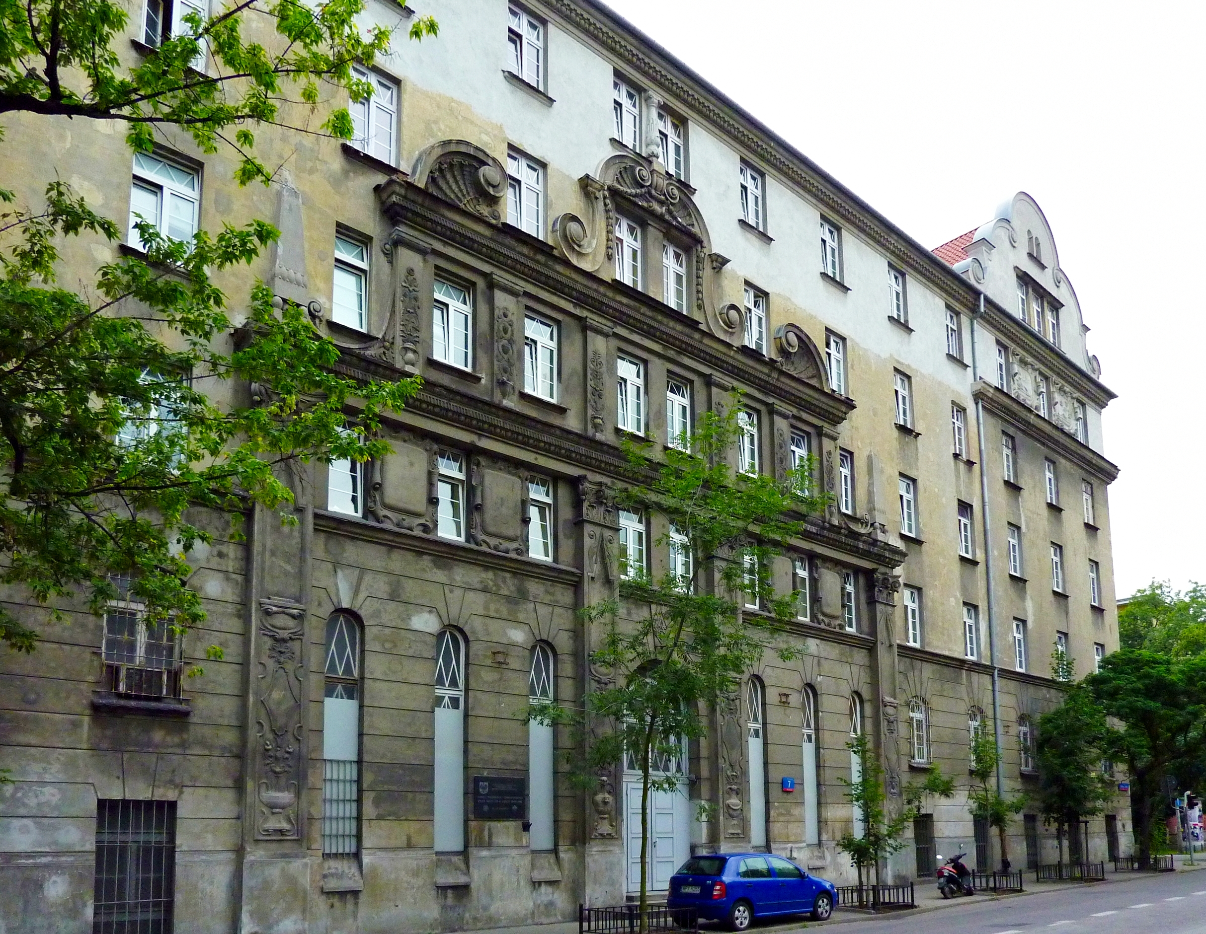 Warszawa, ul. Sierakowskiego 7 – Dom Akademicki Studentów Żydów, ob. komenda policji, 1924-26 (zabytek A-663 z 16.12.2005).